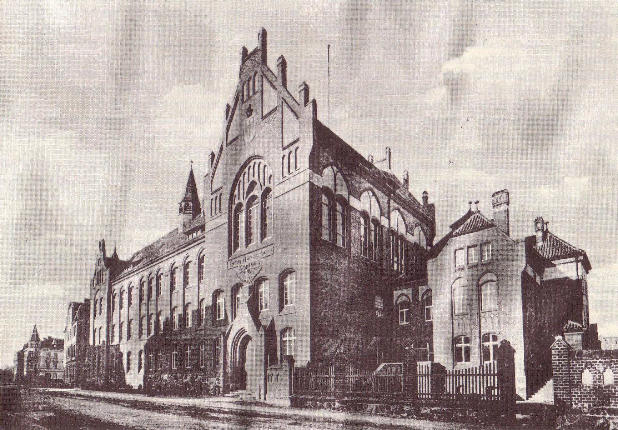 Reformgymnasium „Herzog-Albrecht-Schule“ in Rastenburg, Ostpreußen, erbaut 1904–1907